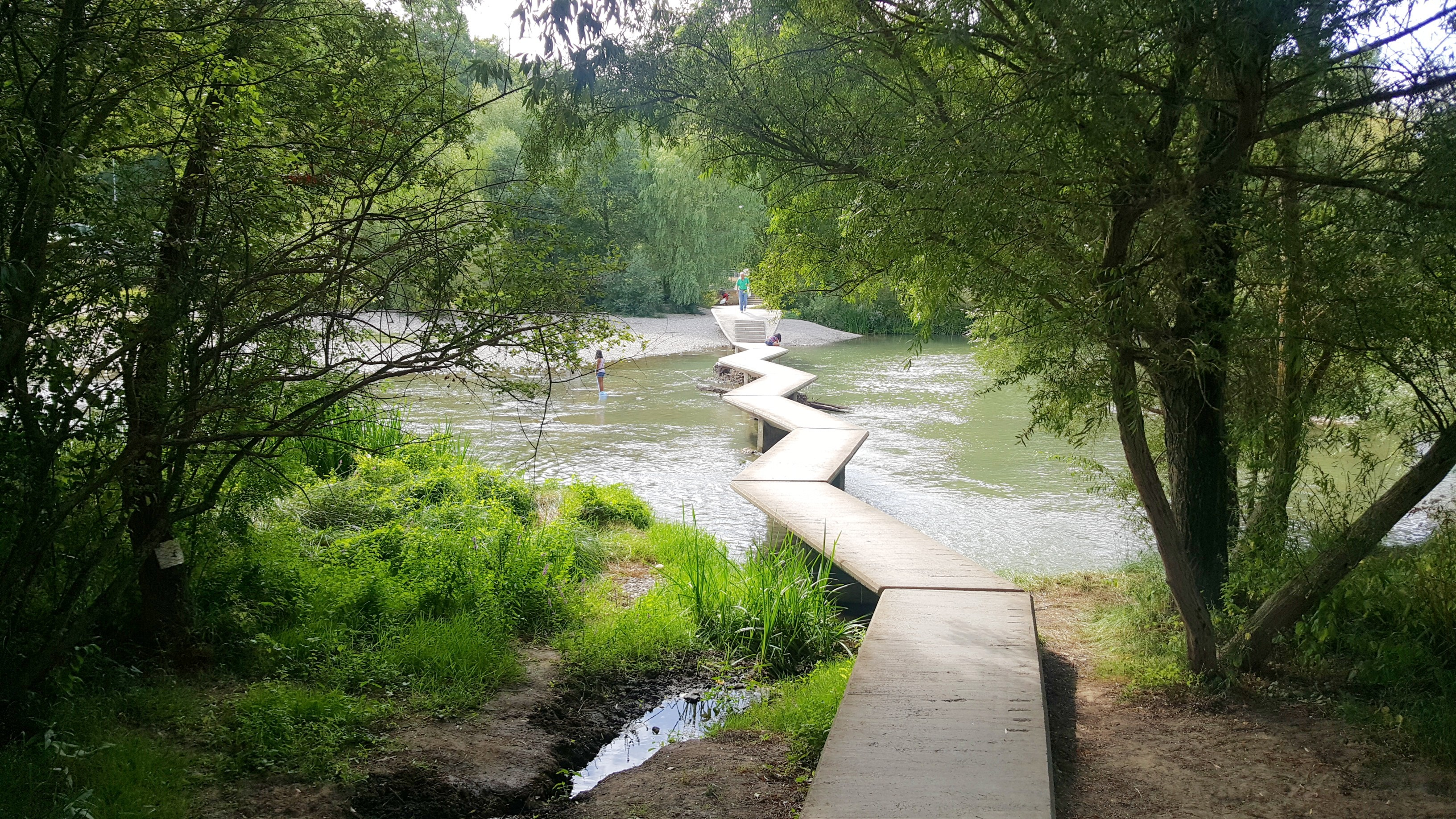 Pasarelak Arga ibaian Iruñean